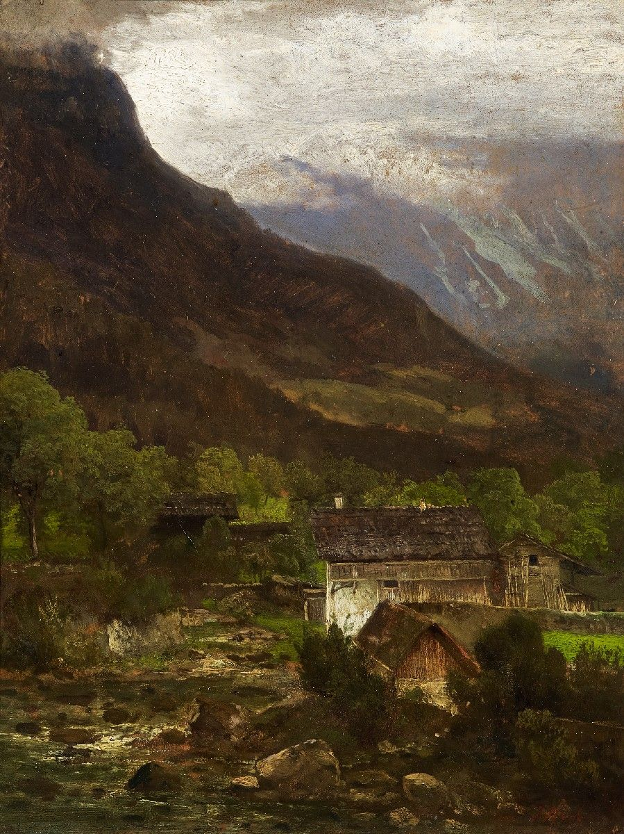 Am Fuße der Alpen. Signiert unten rechts: J. Sperl (nachgezogen). Öl auf Holz. 44 x 33,5 cm.